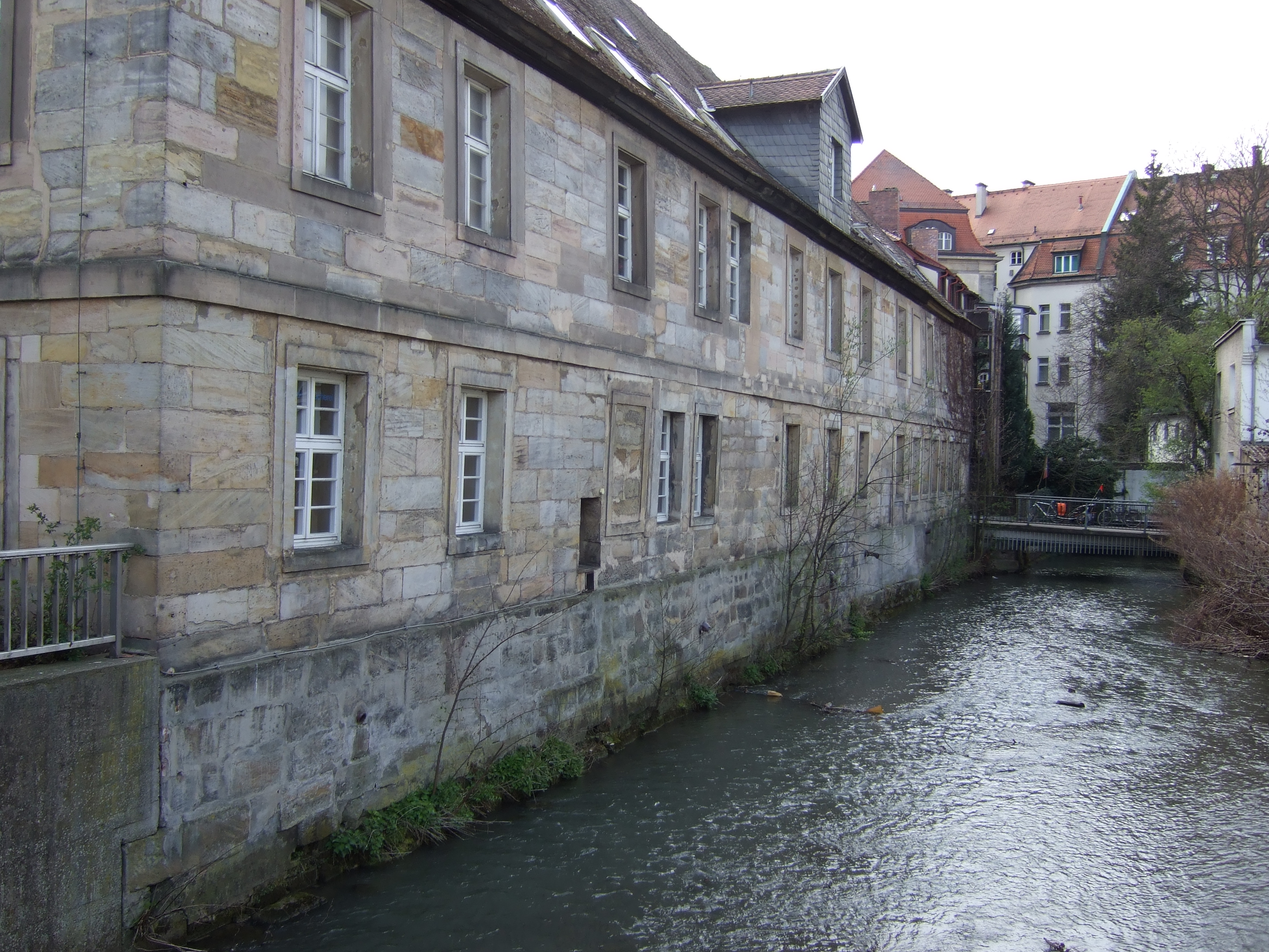 Mühlkanal Bayreuth Telemannstraße